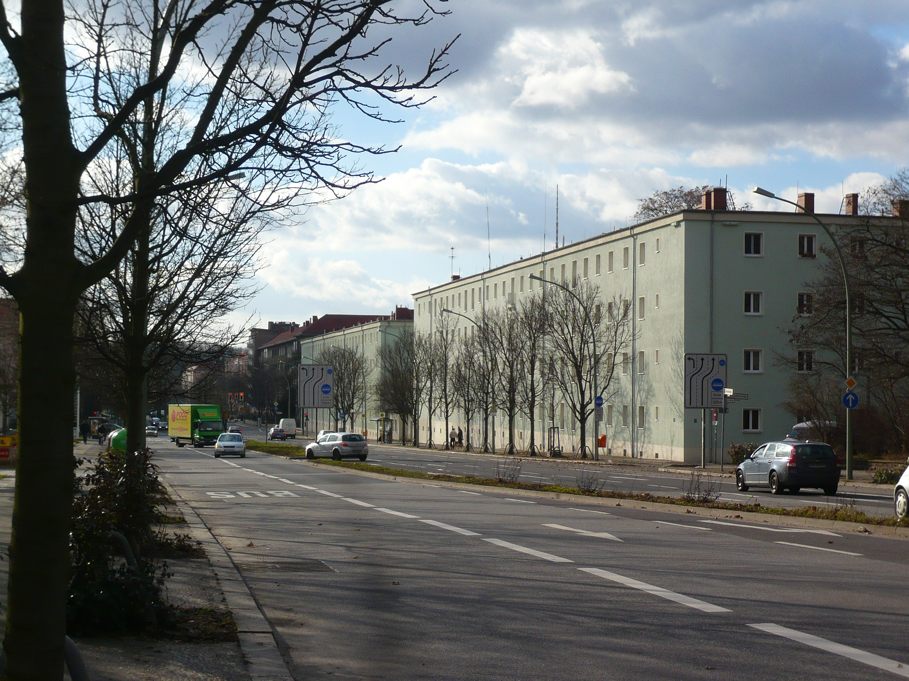 Straße in Prenzlauer Berg: Kniprodestraße